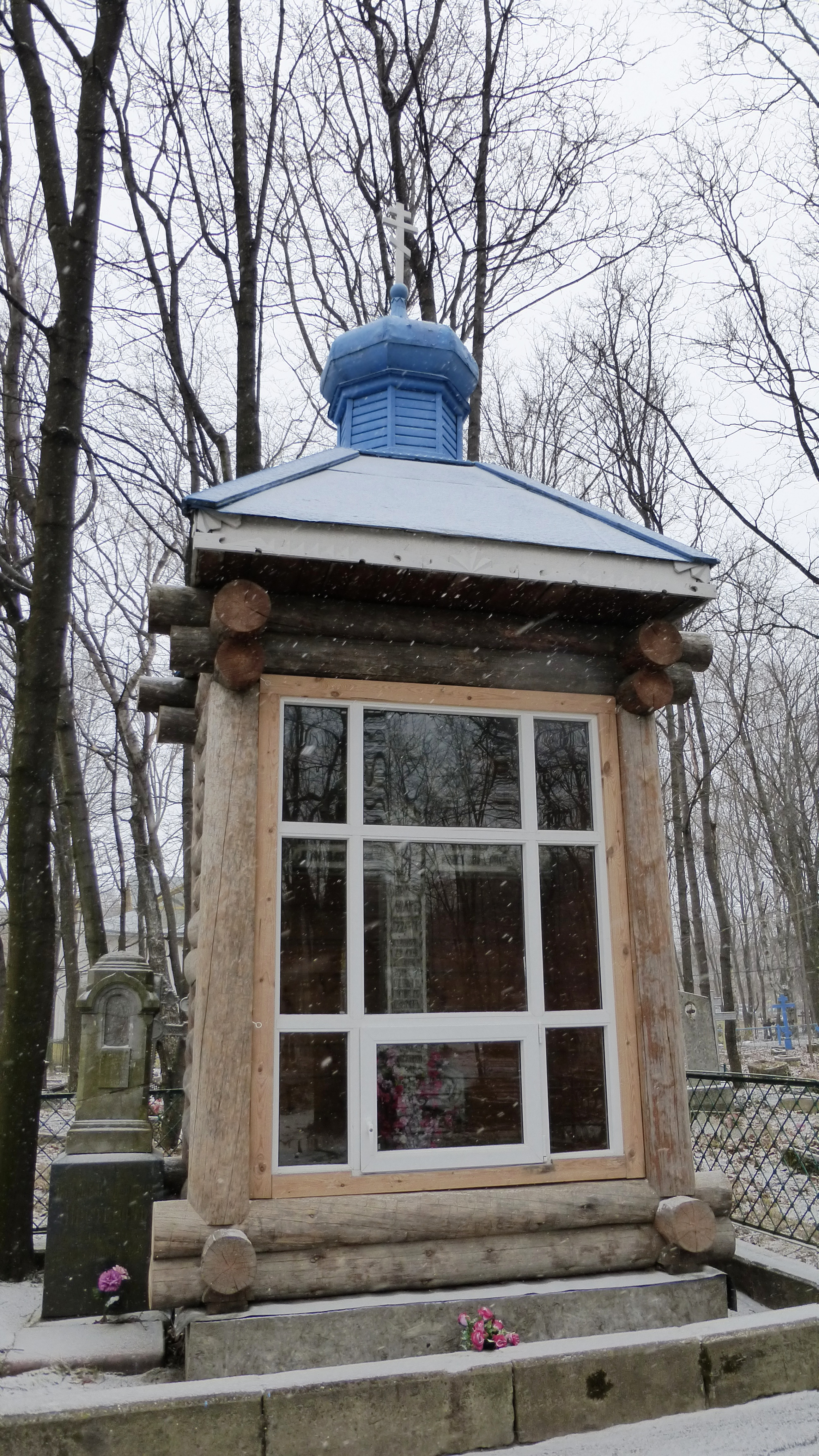 Поклонный крест, воздвигнутый в 1725 году на средства жителя заводской слободы И. И. Сараева в память последнего пребывания императора Петра Великого на Олонецких Петровских заводах. Расположен в ограде Крестовоздвиженского собора в Петрозаводске.